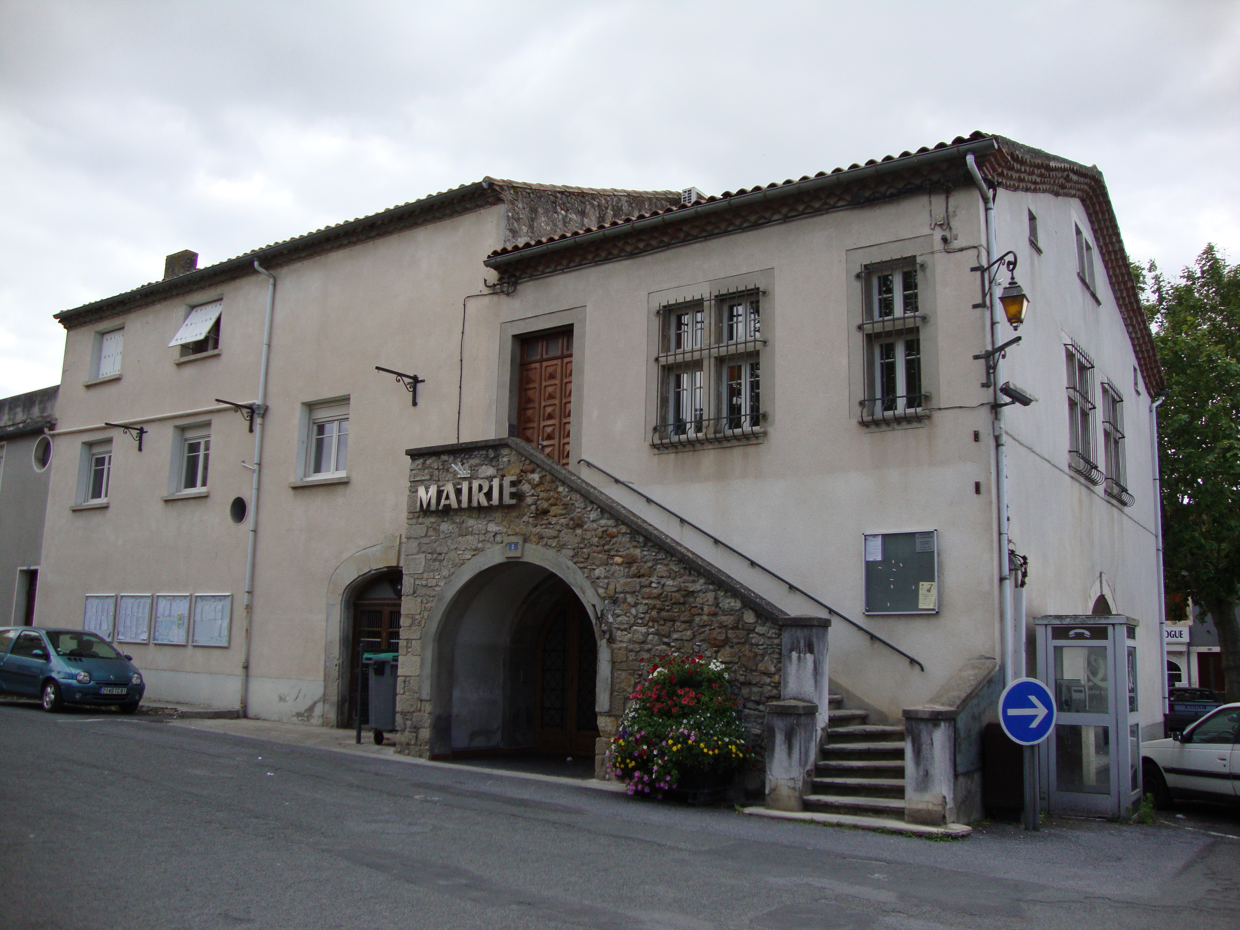 Saïx (Tarn, Fr) mairie